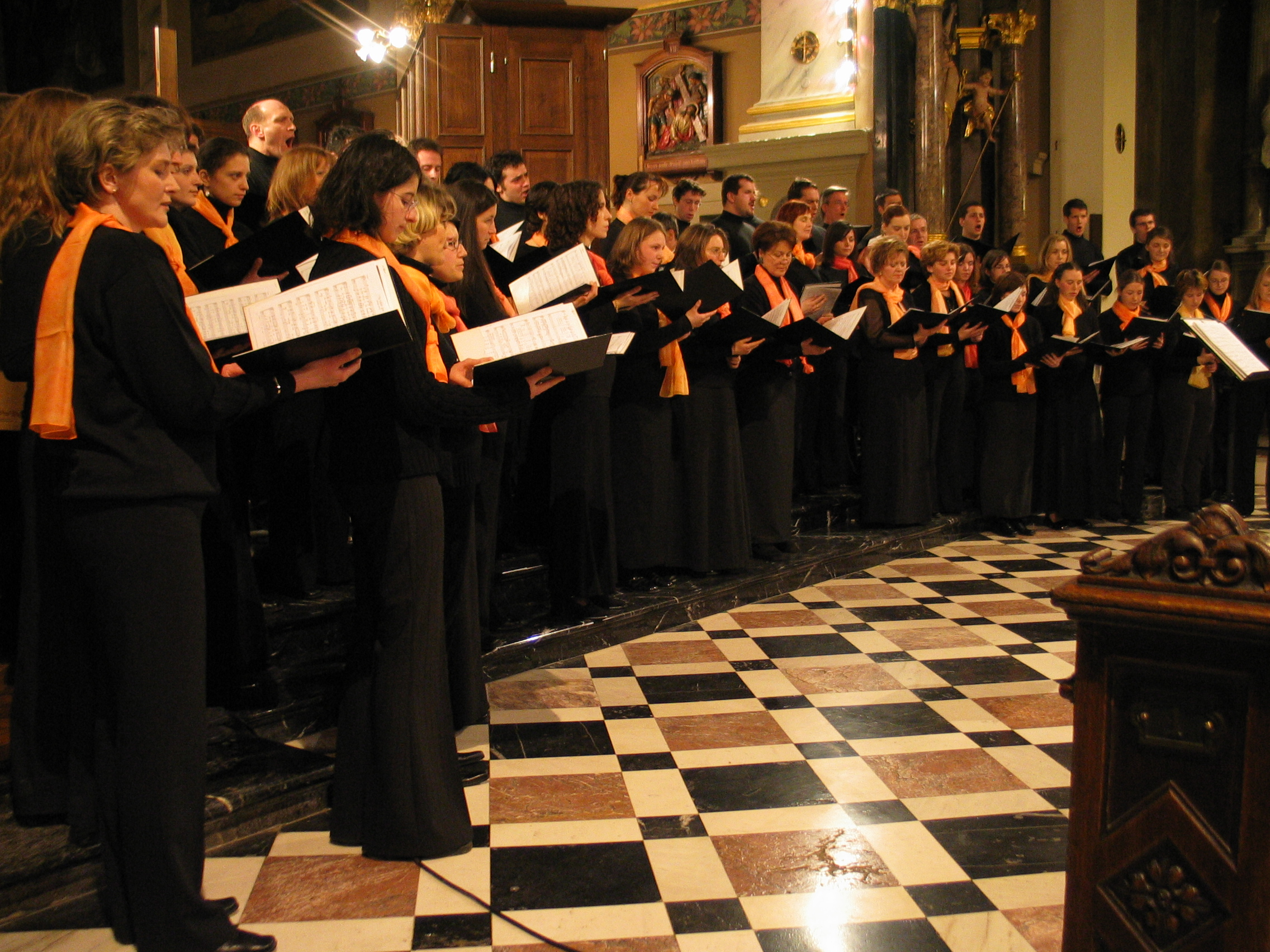 Zbor ob 25. letnici obstoja.